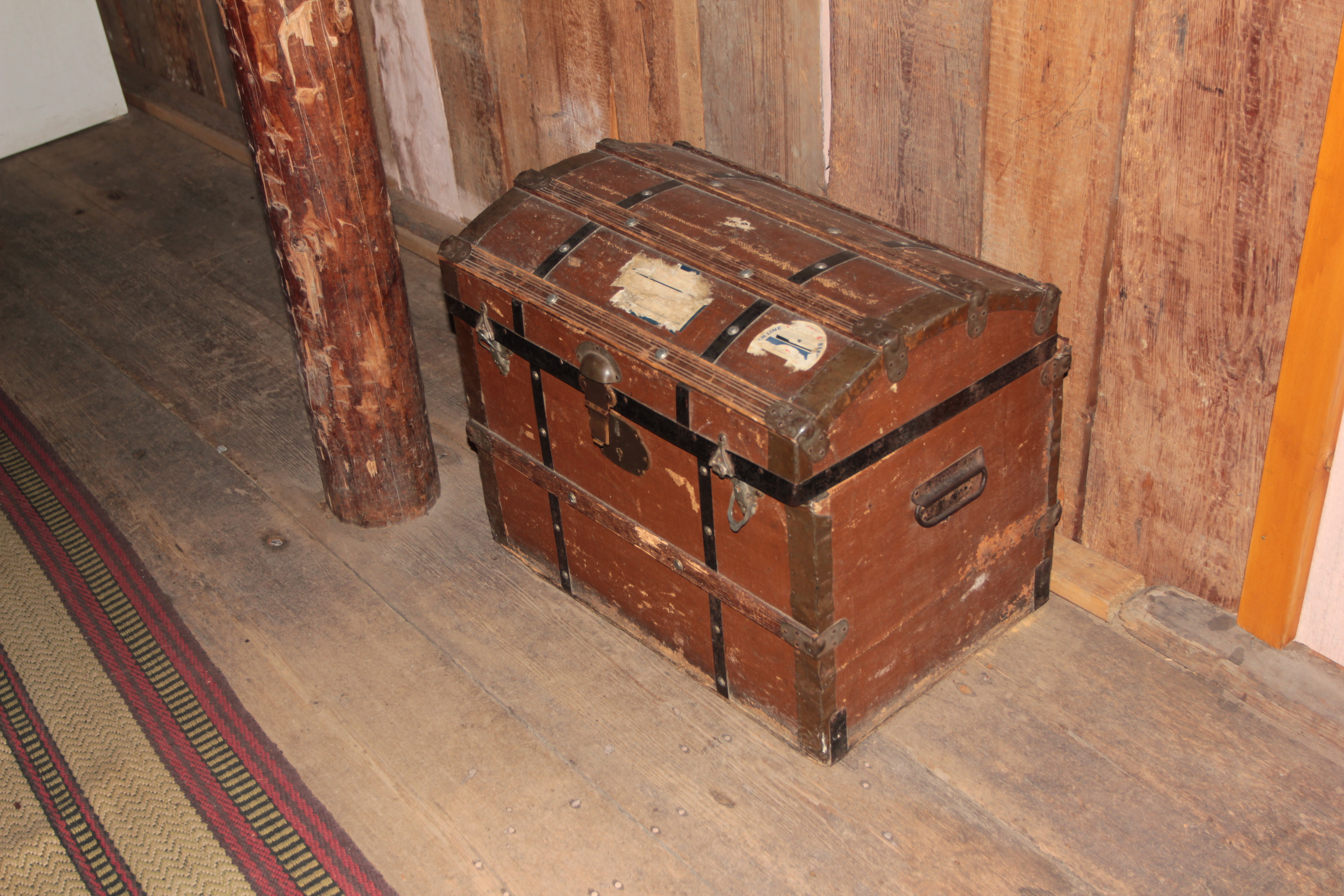 Hedemora Gamla Theater